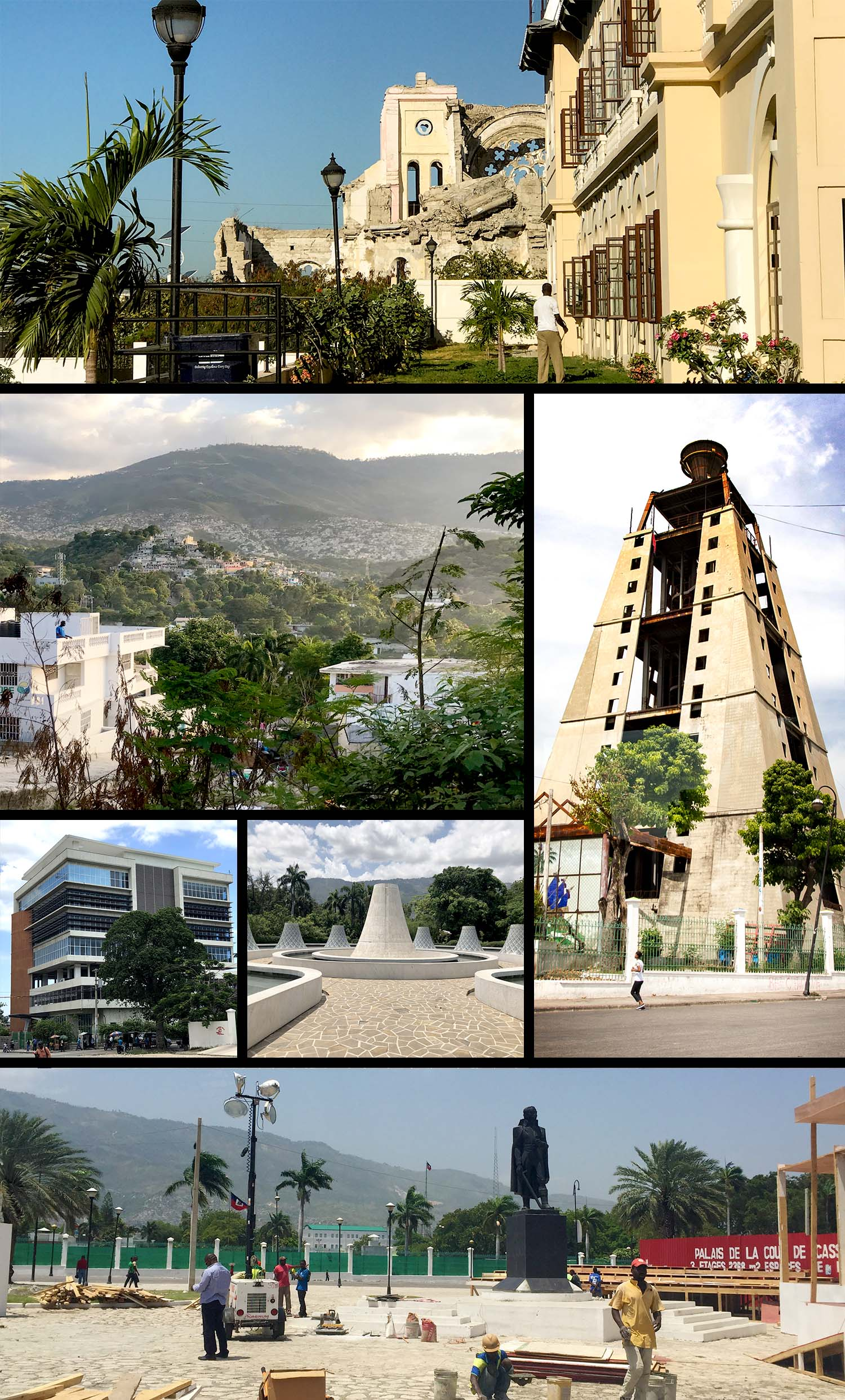 Réalisé à partir des fichiers suivants